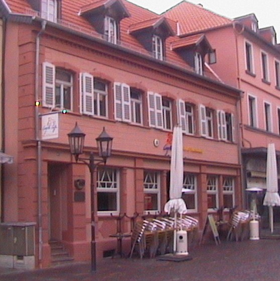 GeburtshausAlbertWeisgerberStIngbert